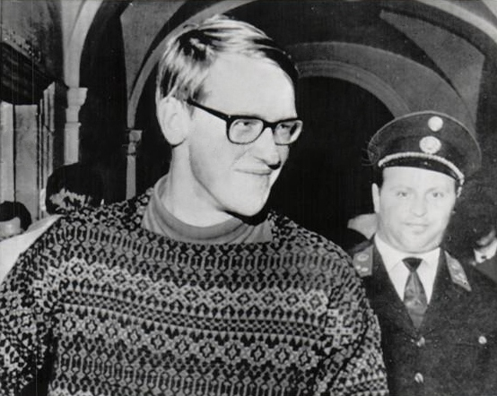 1964 PRESS PHOTO U.S. ATHLETE ACQUITTED